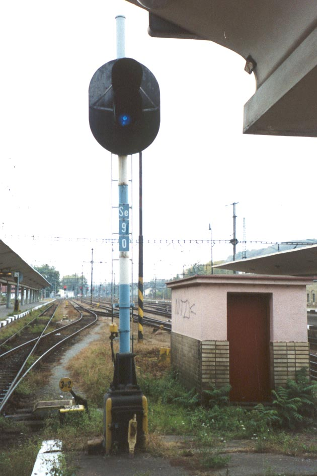 Seřaďovací návěstidlo v žst. Praha Smíchov. Podzim 2006